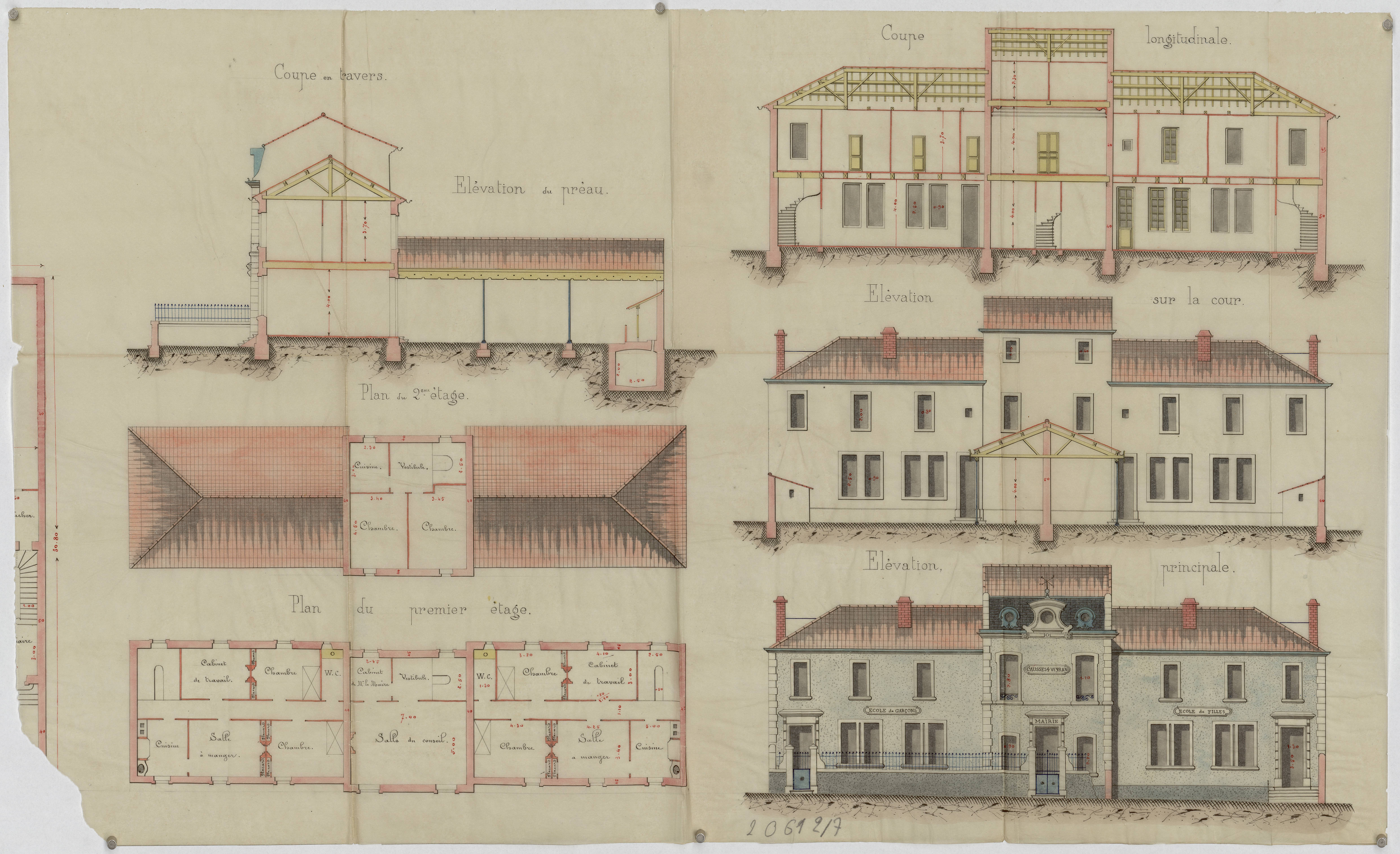 Causses-et-Veyran. - Construction d'un groupe scolaire pour filles et garçons et d'une mairie : plans, élévations.